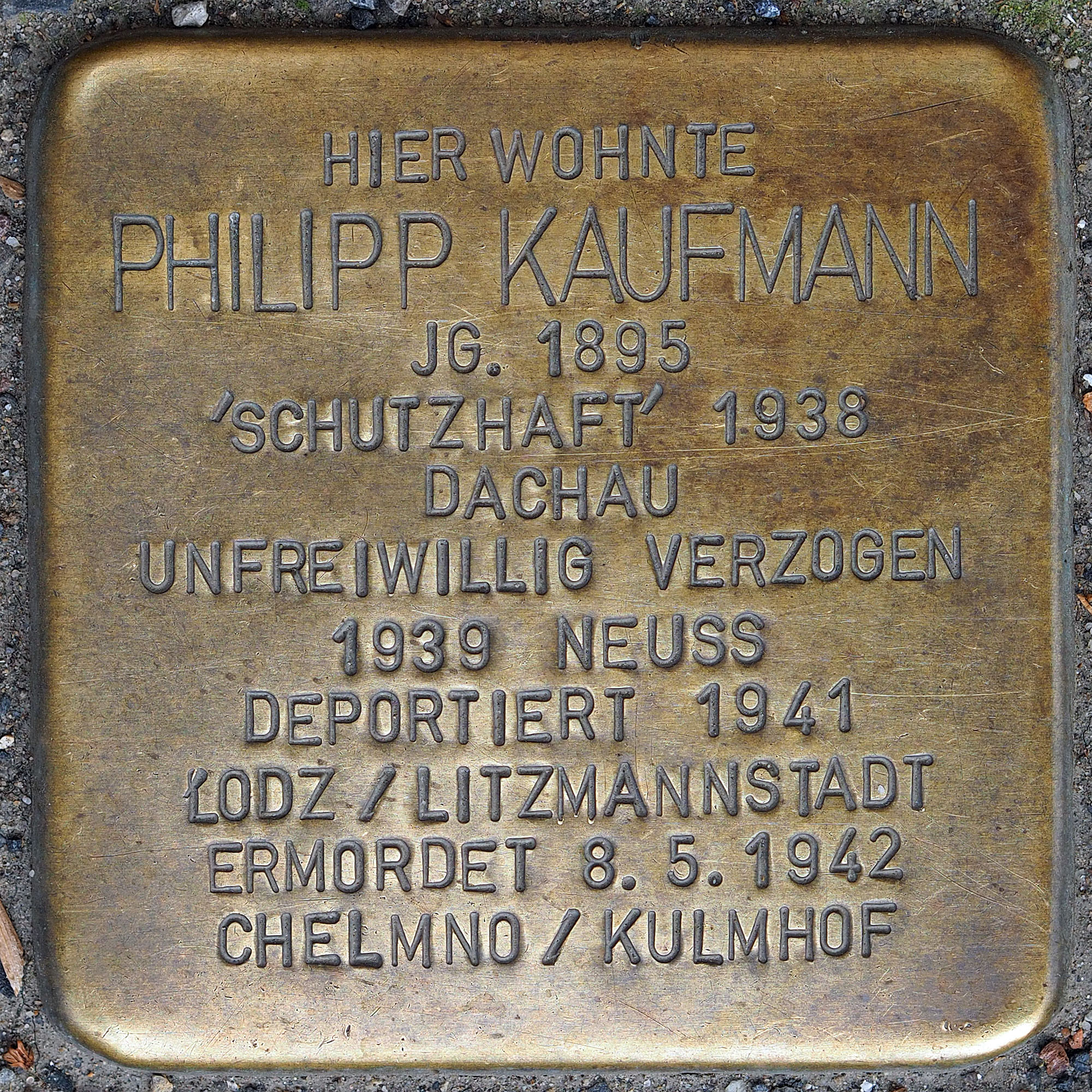 Stolpersteine GV: Kaufmann, Philipp